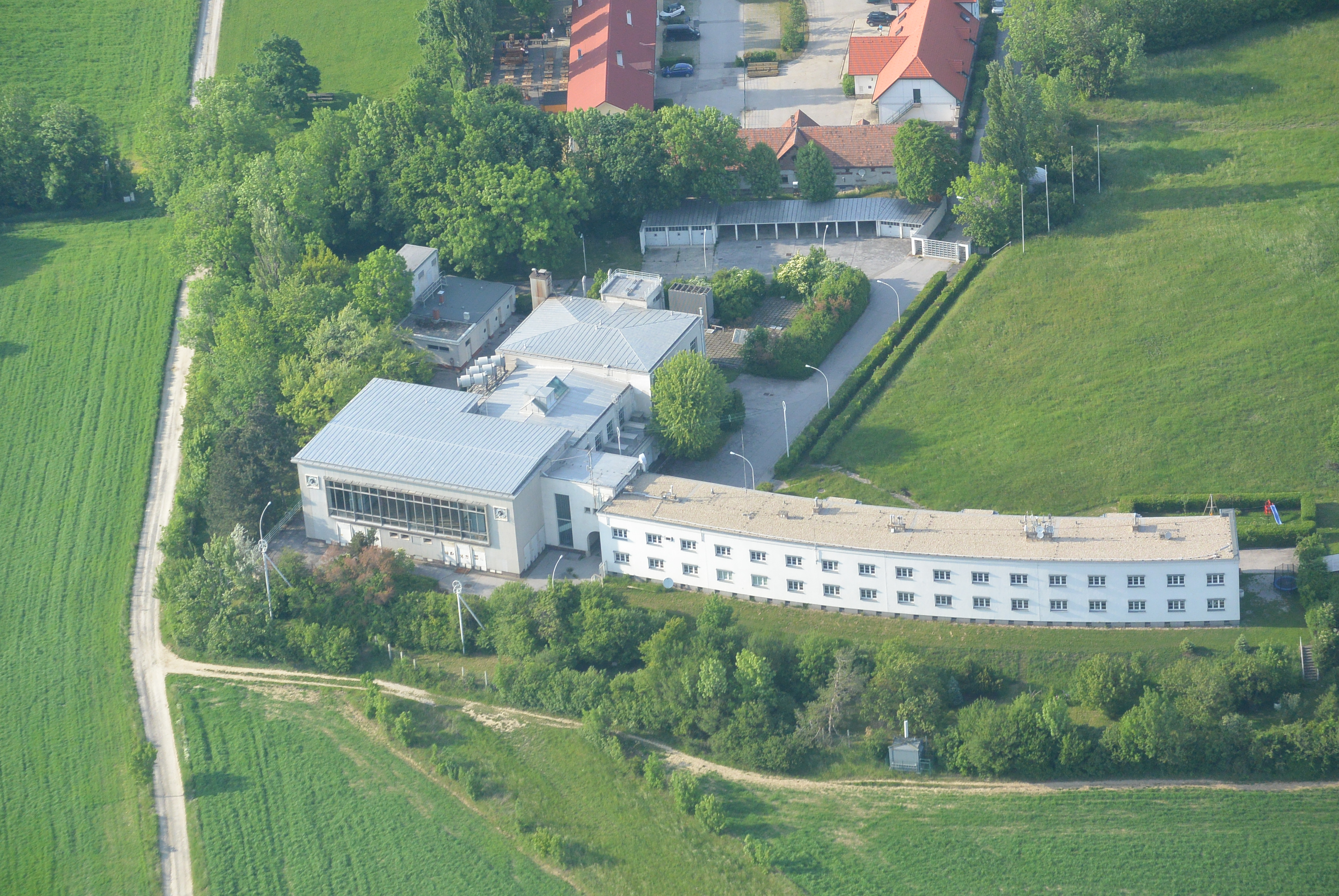 Luftbild des Sendergebäudes Bisamberg